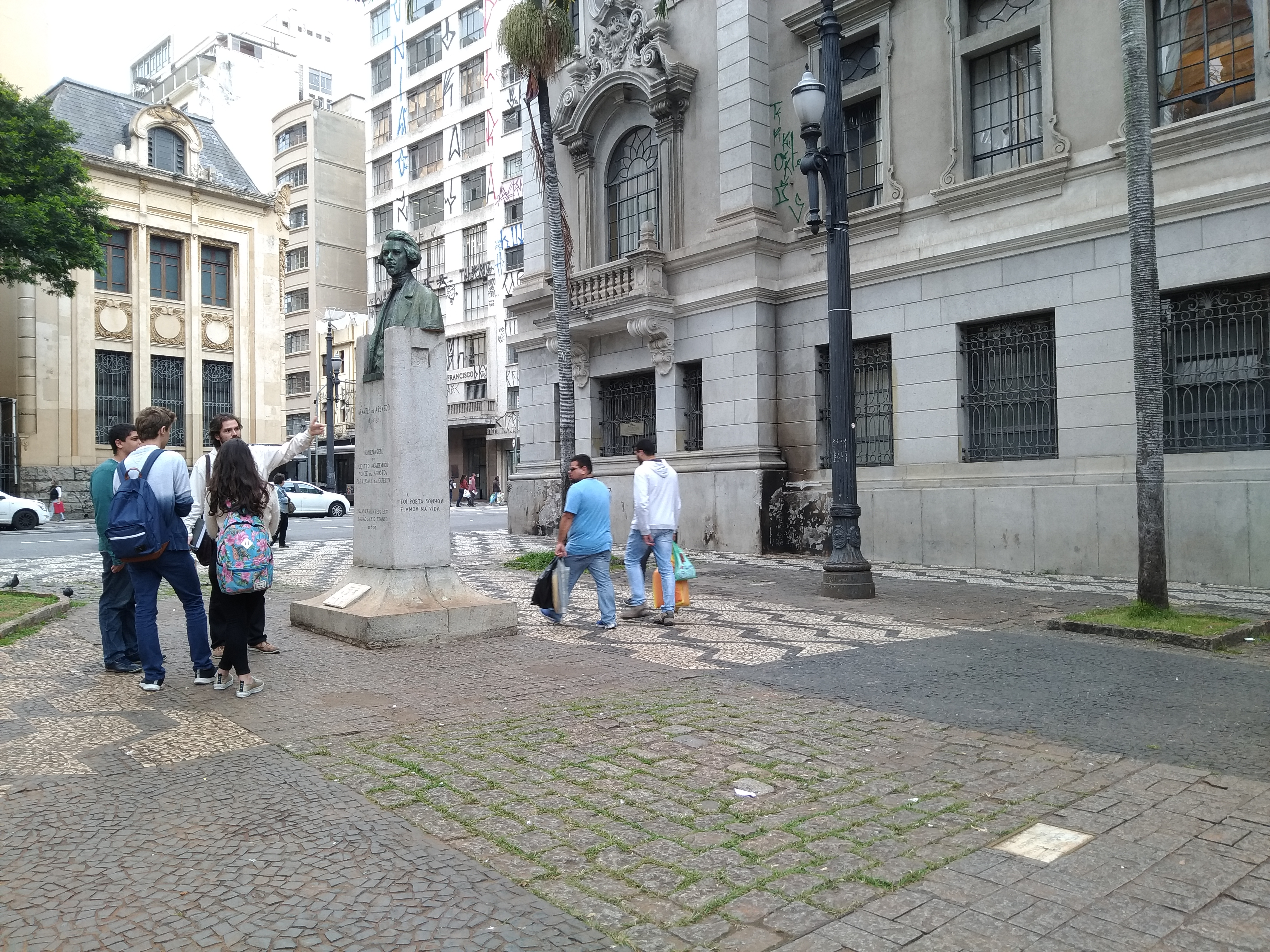 Monumento "Quantas Pedras Forem Colocadas Tantas Arrancaremos" em frente a Faculdade de Direito da USP, no Largo São Francisco. O monumento é a placa no chão, do lado direito da foto. Do lado esquerdo encontra-se o monumento dedicado à Álvares de Azevedo.